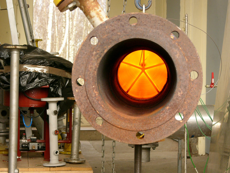 Schaer Hitech Flammendurchschlagsicherung bei der Baumusterprüfung